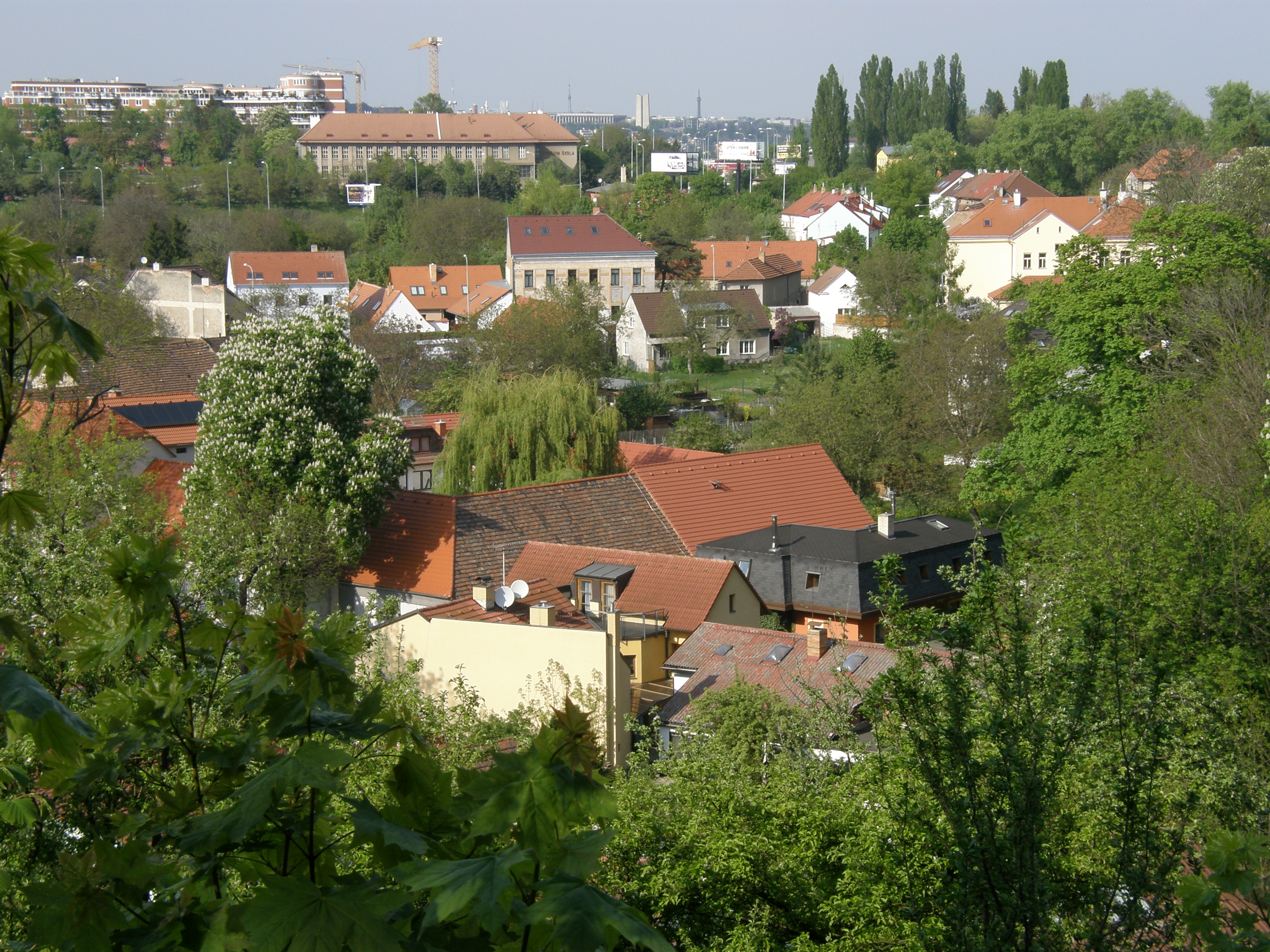 Pohled na Butovice, v pozadí Jinonice